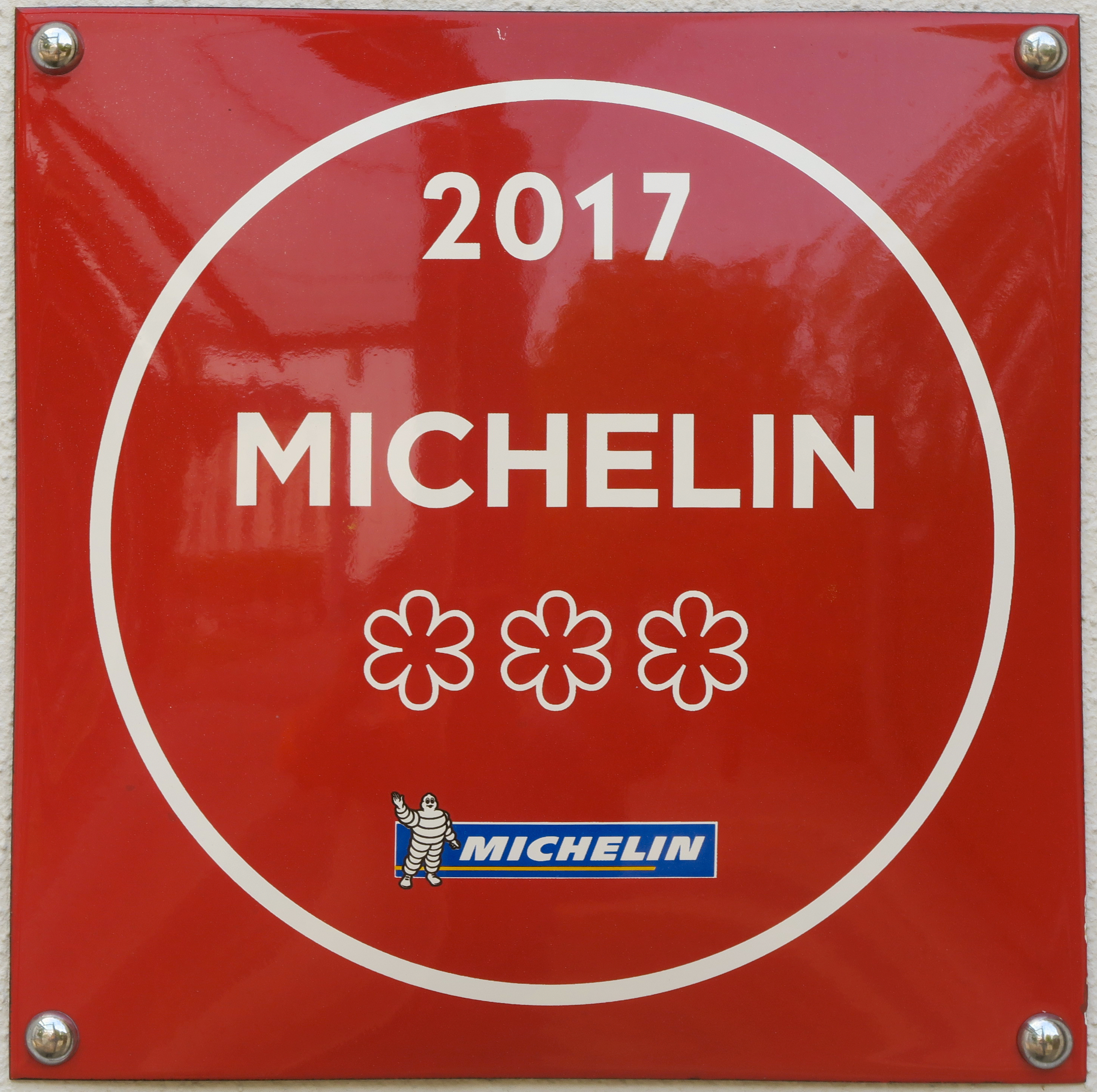 Hinweis auf die drei Michelin-Sterne am Restaurant Vendôme in Bensberg